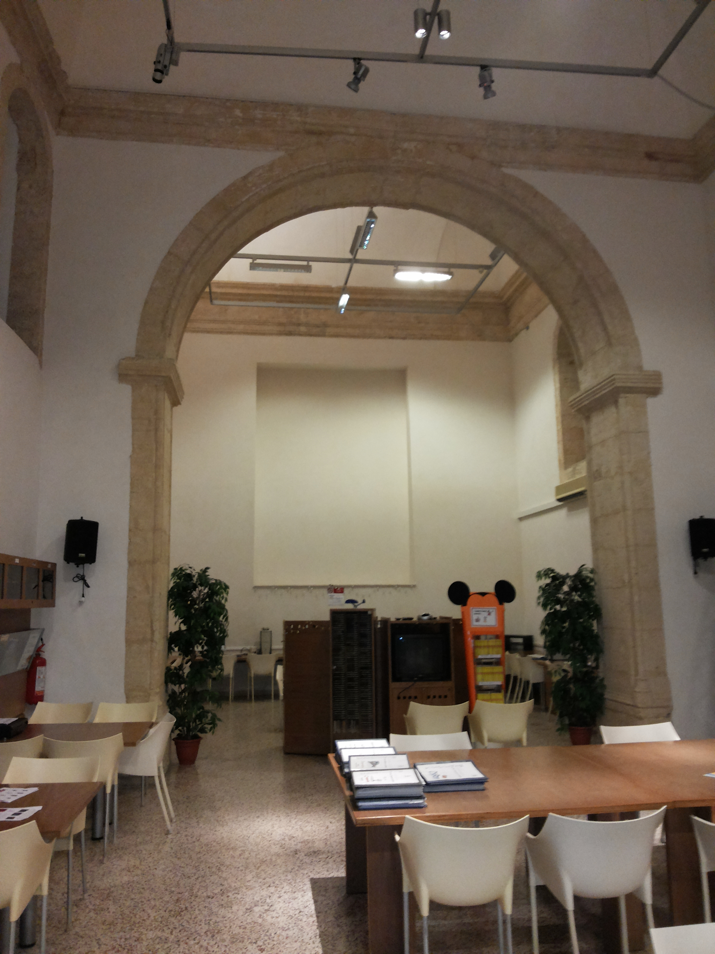 Biblioteca Multimediale (Alcamo)